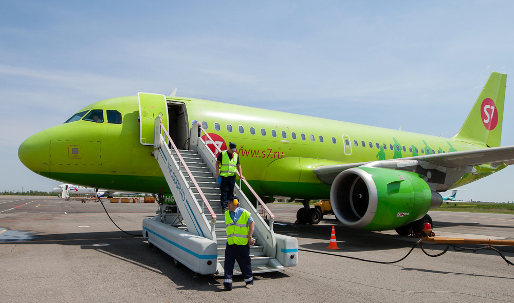 Airbus авиакомпании S7 и мобильный трап в аэропорте Гумрак